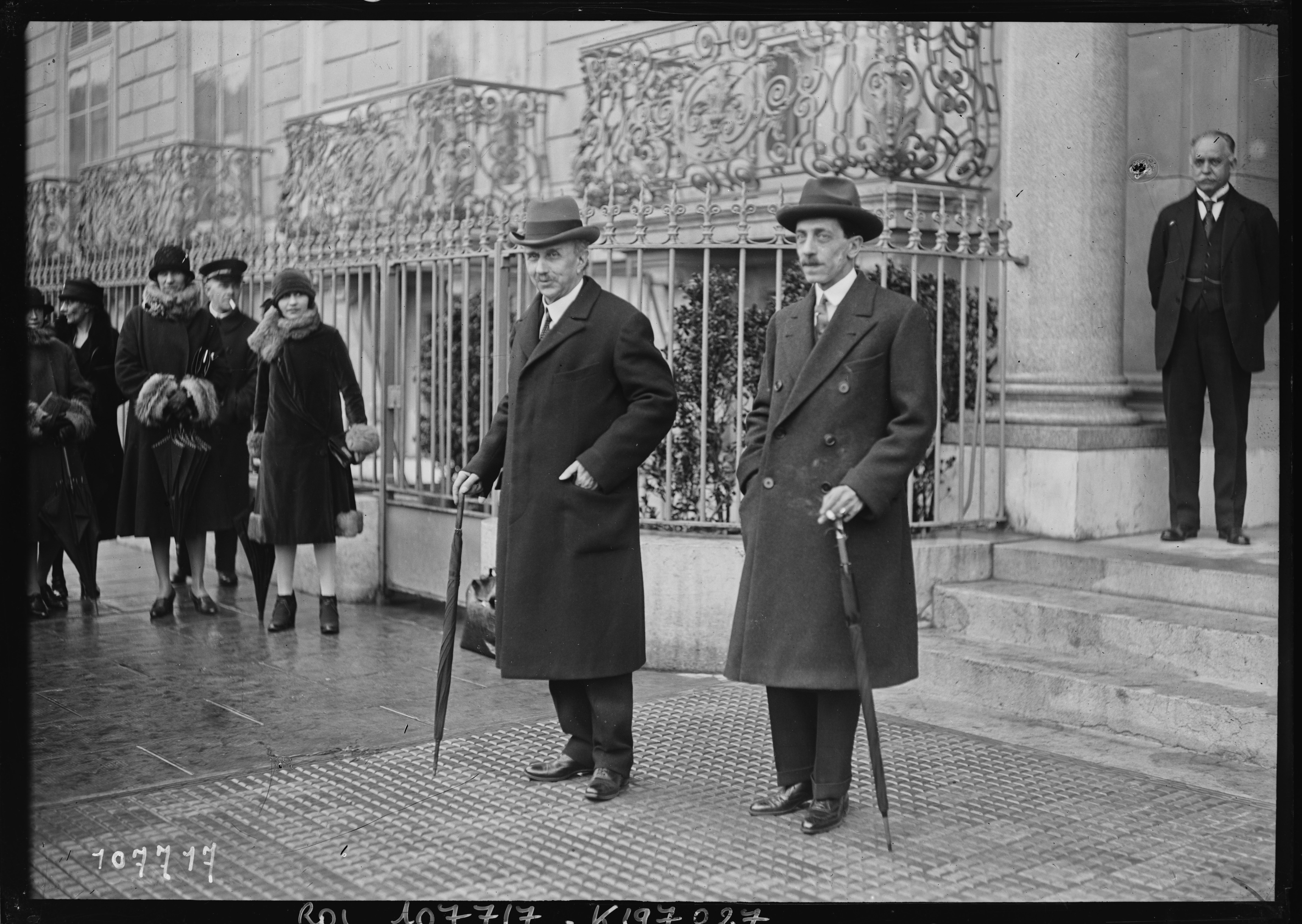 8-3-26, [Genève, assemblée de la S.D.N.,] M. Scialoja quittant l'hôtel Beau-Rivage après son entretien avec M. Chamberlain : [photographie de presse] / [Agence Rol]